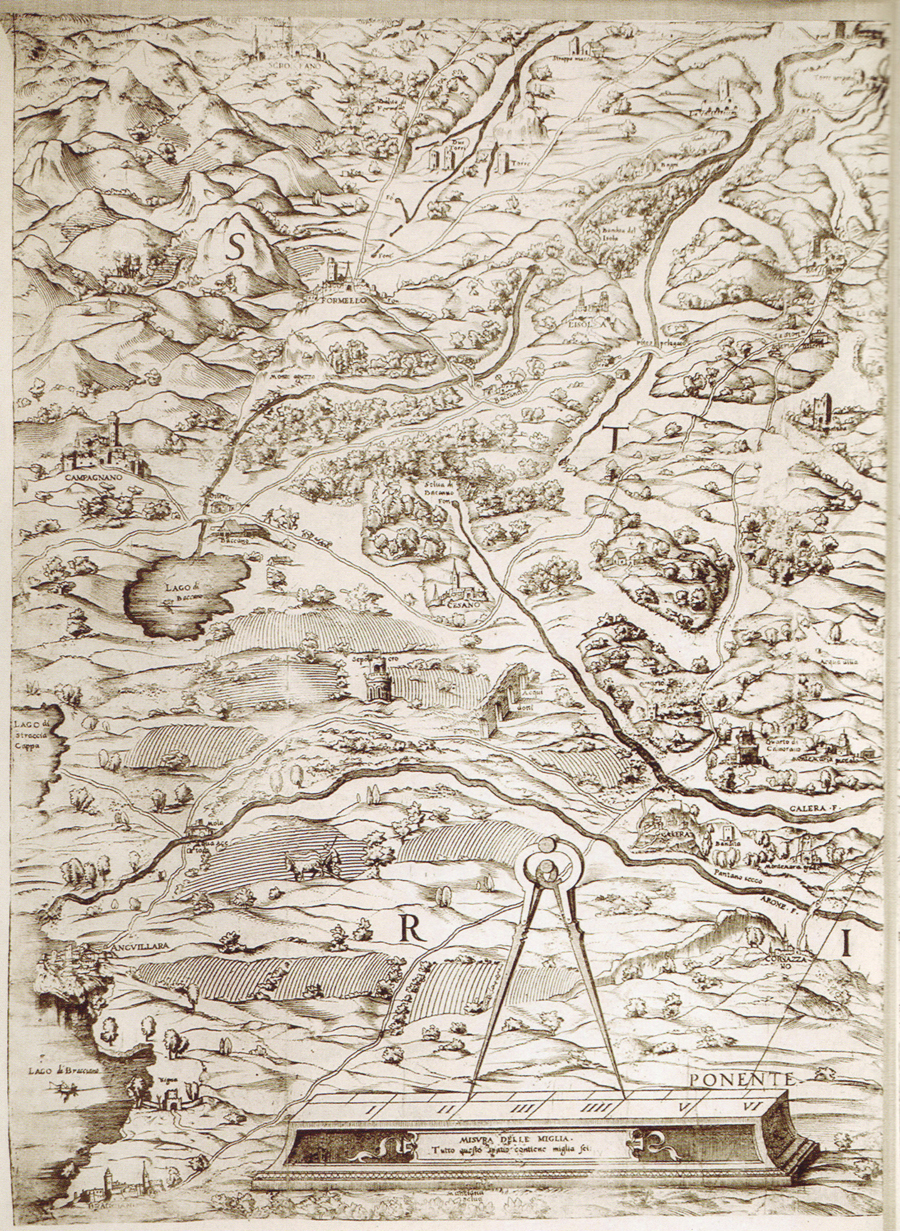 Particolare del territorio di Campagnano della mappa del 1547 della Campagna Romana di Eufrosino della Volpaia fatta riprodurre da Thomas Ashby nel 1914 dall'unico esemplare esistente conservato nella Biblioteca Vaticana.